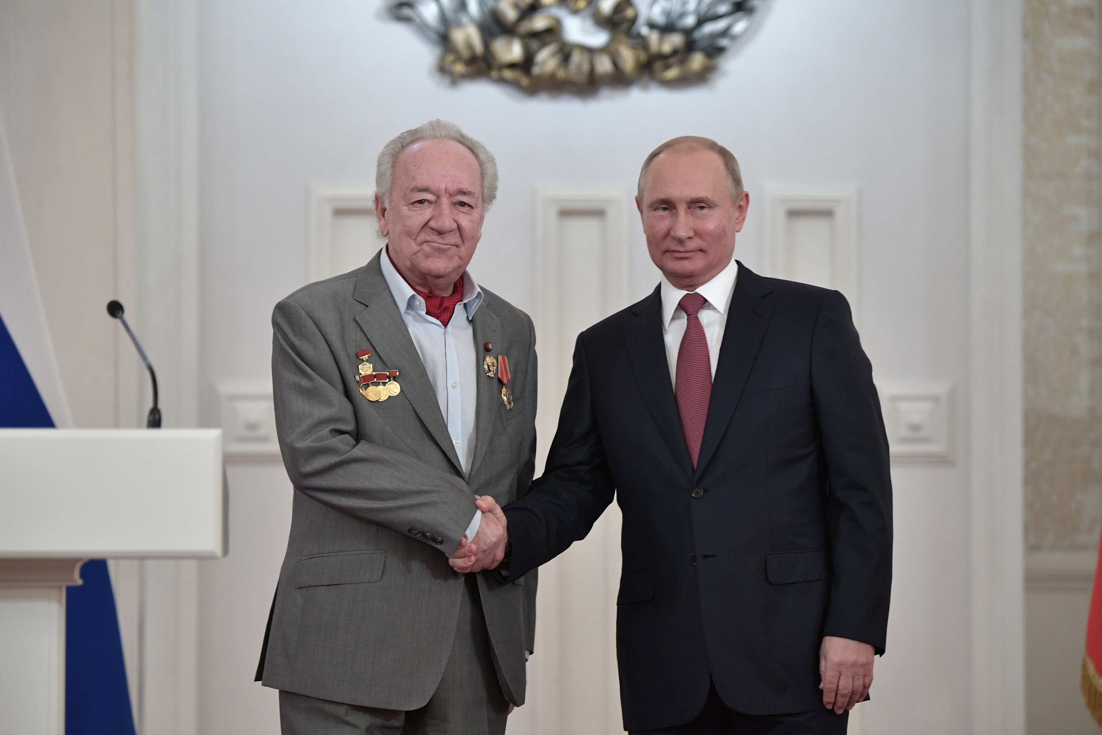 Церемония вручения государственных наград.